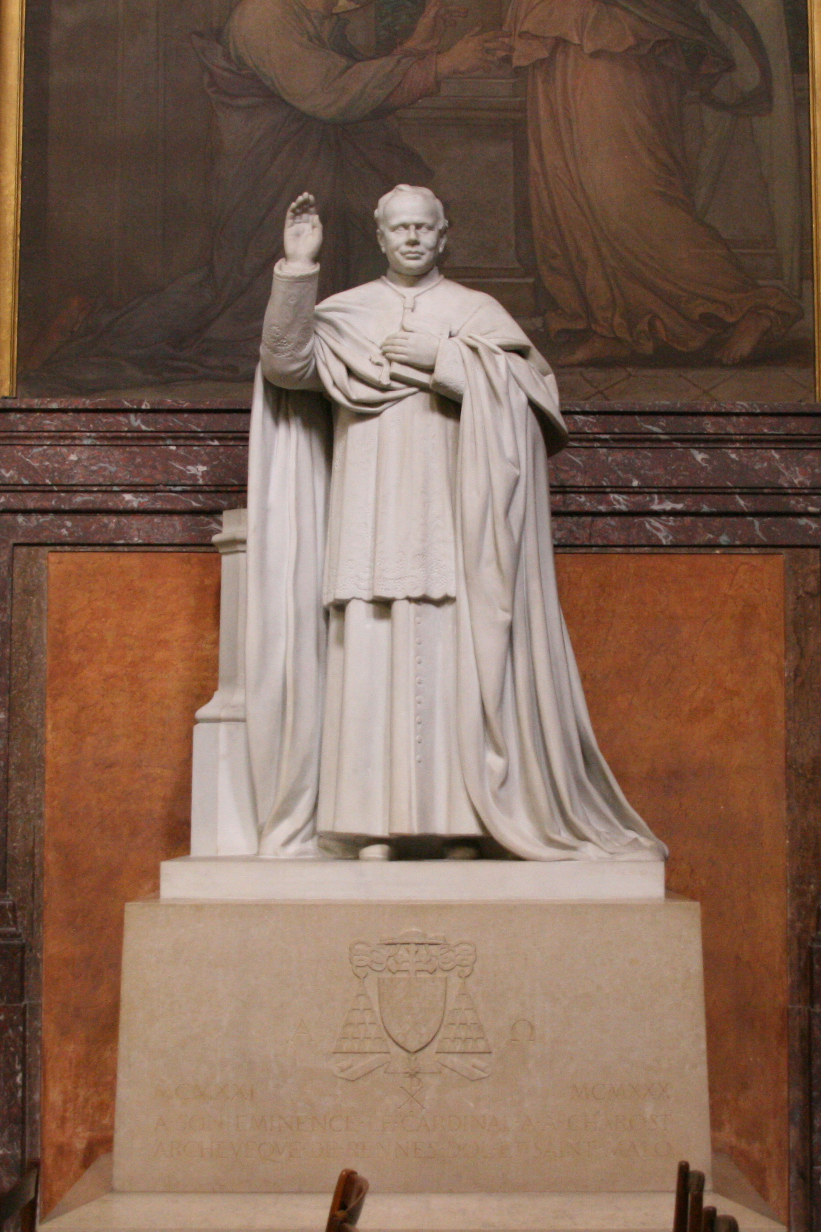 Statue du cardinal Alexis Charost, dans la cathédrale Saint-Pierre de Rennes.